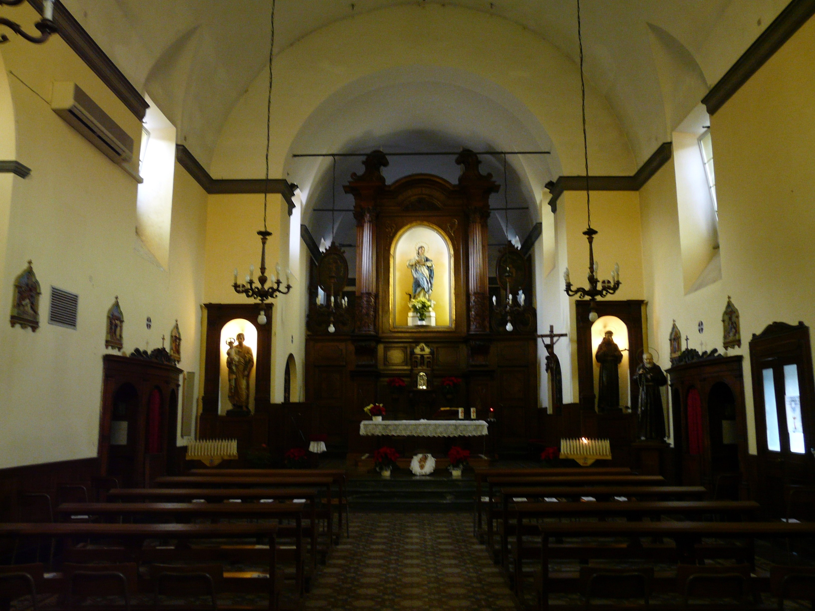 Navata centrale della chiesa dei Frati Cappuccini, Quartiere di Corte, Comune di Santa Margherita Ligure, Liguria, Italia